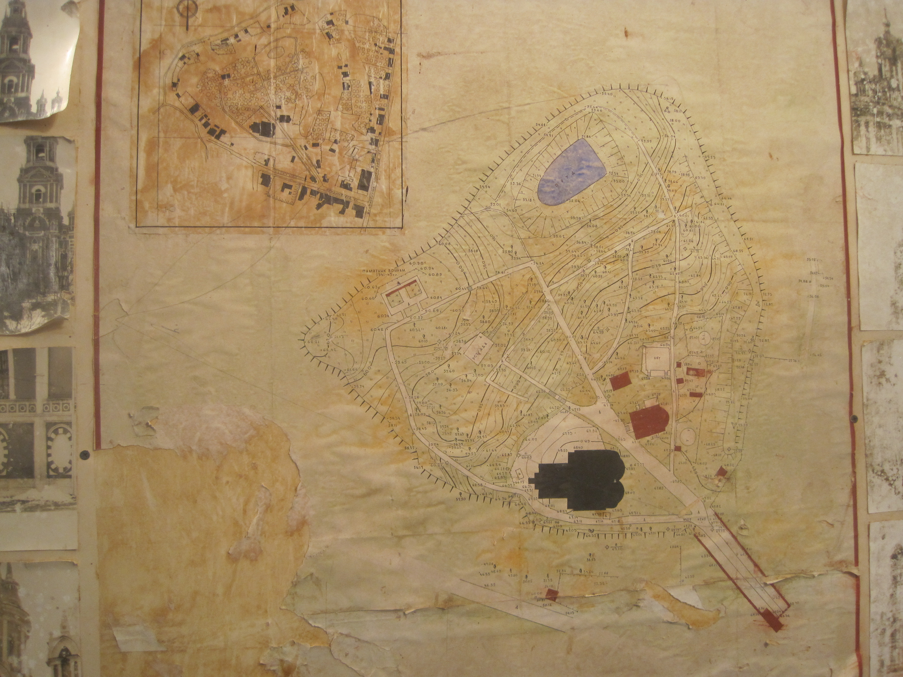 Карта кремля из музея